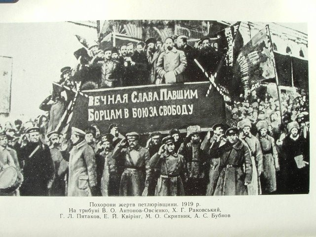 Похороны жертв петлюровщины